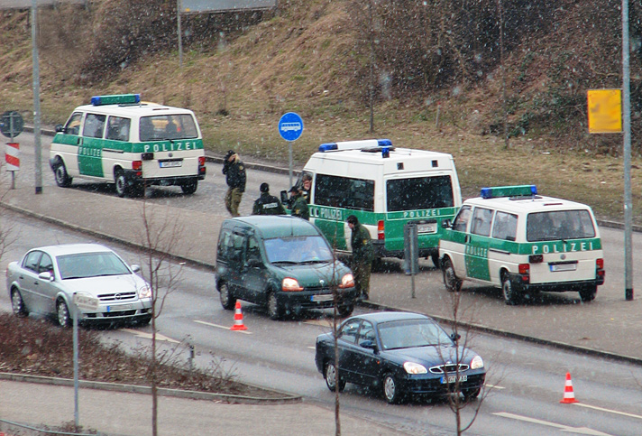 Beschreibung: Kontrolle der von der Insel Rügen kommenden Fahrzeuge durch die Polizei vor dem Bahnhof am Rügendamm in Stralsund Fotograf: Darkone, 23. Februar 2006